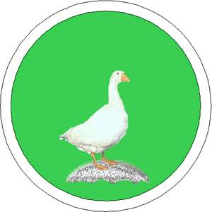 Herb Nowej Wsi w Małopolsce.